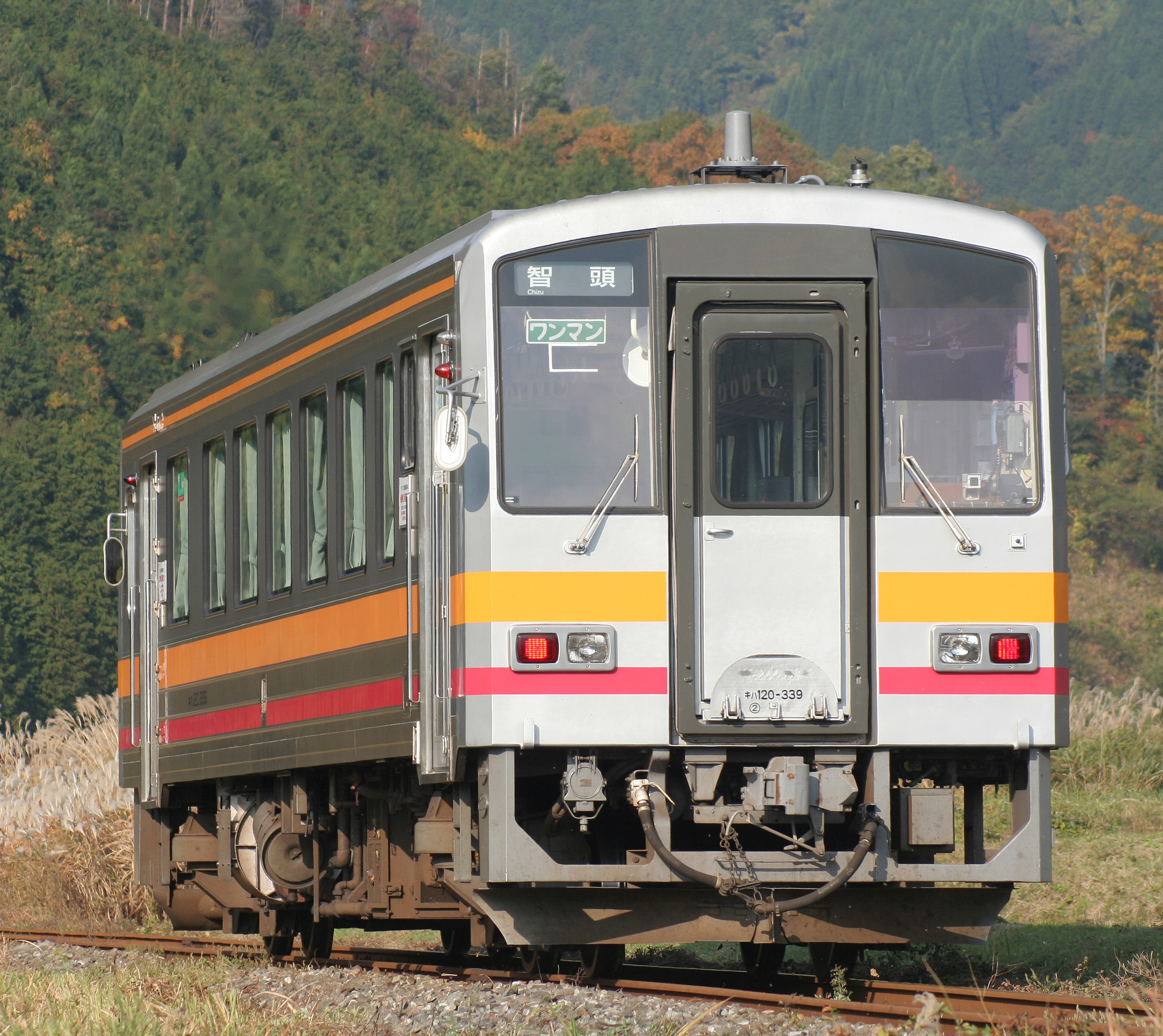 JR西日本キハ120形気動車339 因美線、美作加茂 - 知和